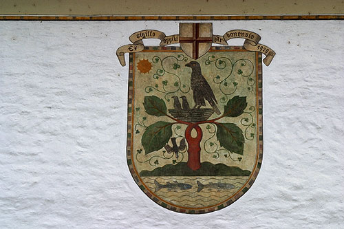 Arboner Wappen am ehemaligen Rathaus, bis Juli 2012 Sitz des Bezirksgerichts